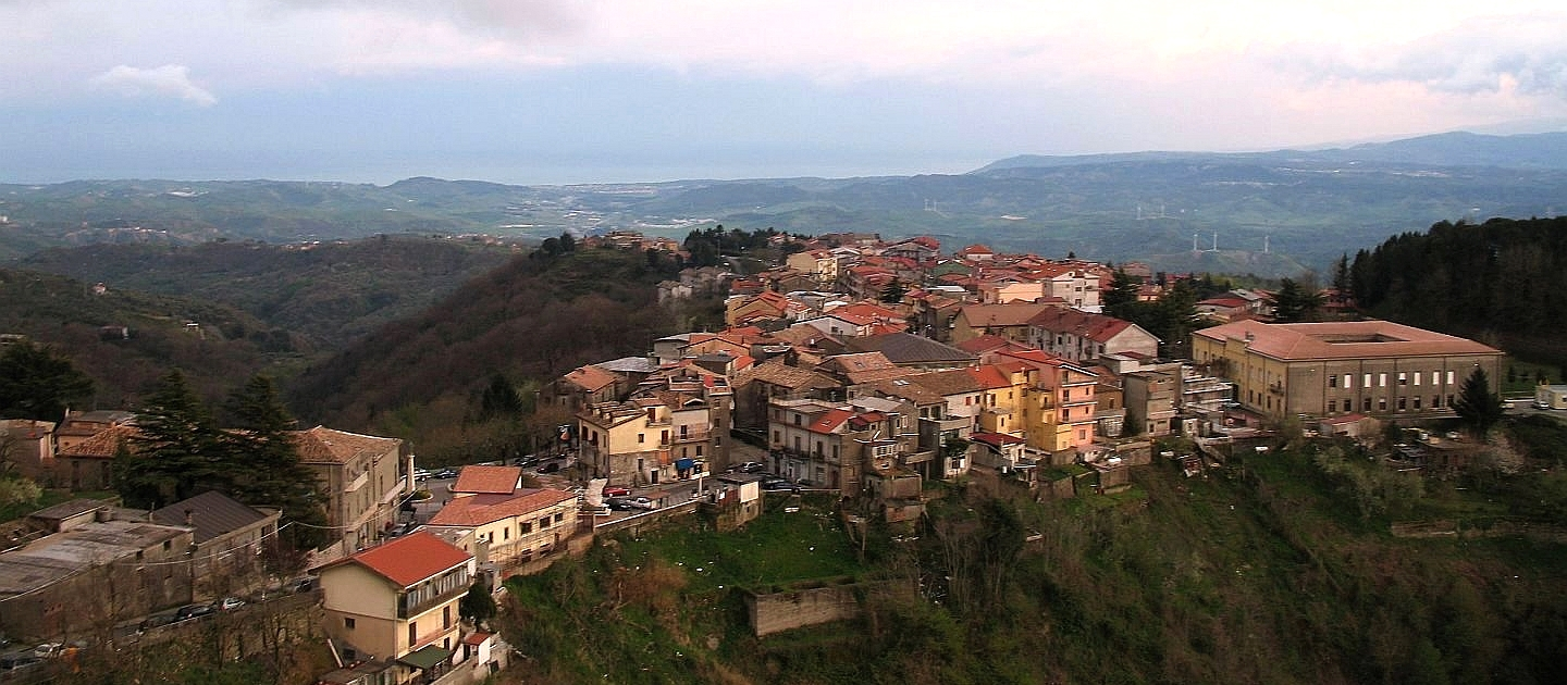 Panoramama di Tiriolo CZ